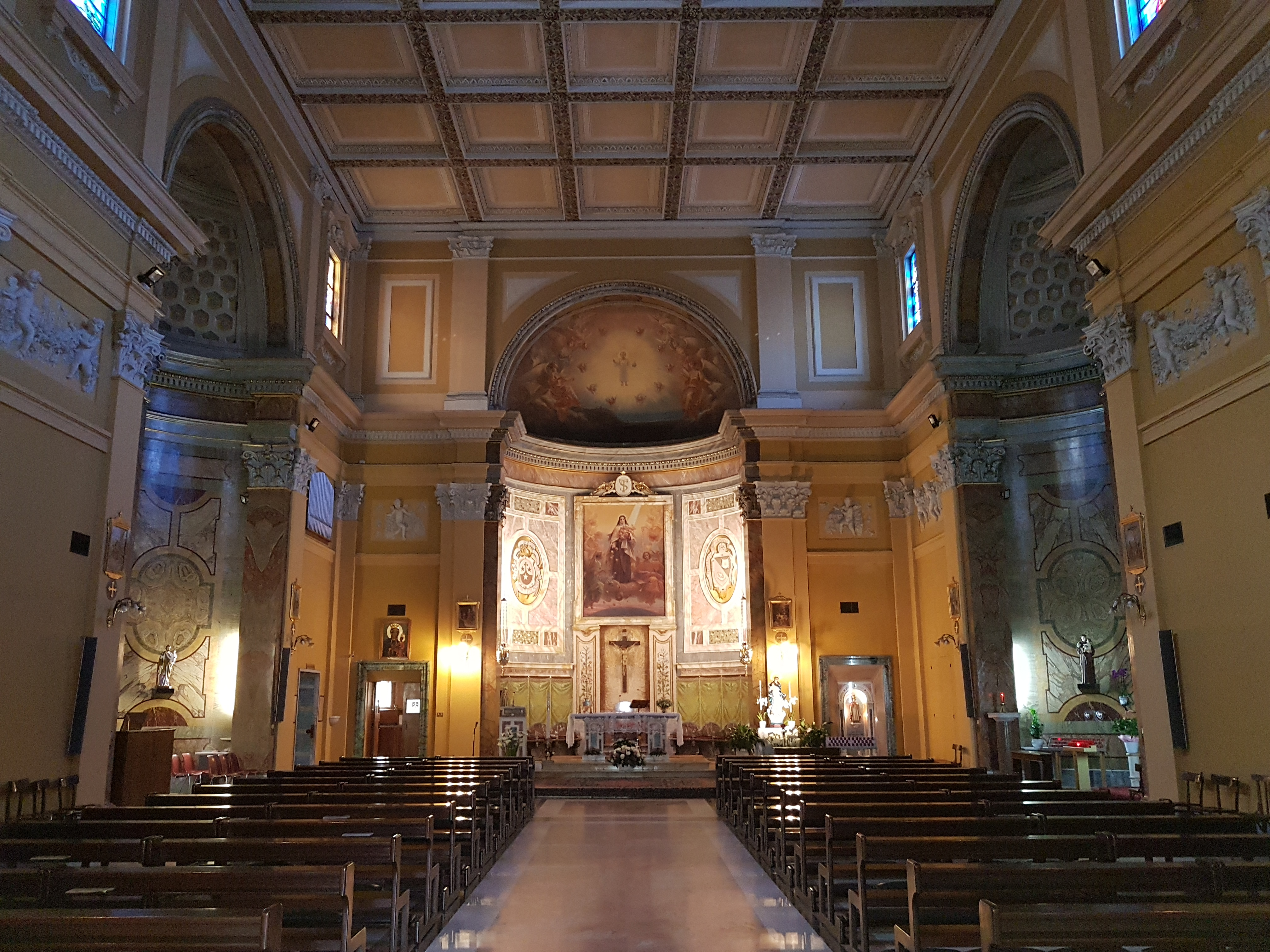 Santa Teresa in Panfilo (Rome), Innenraum mit Blick zum Chor